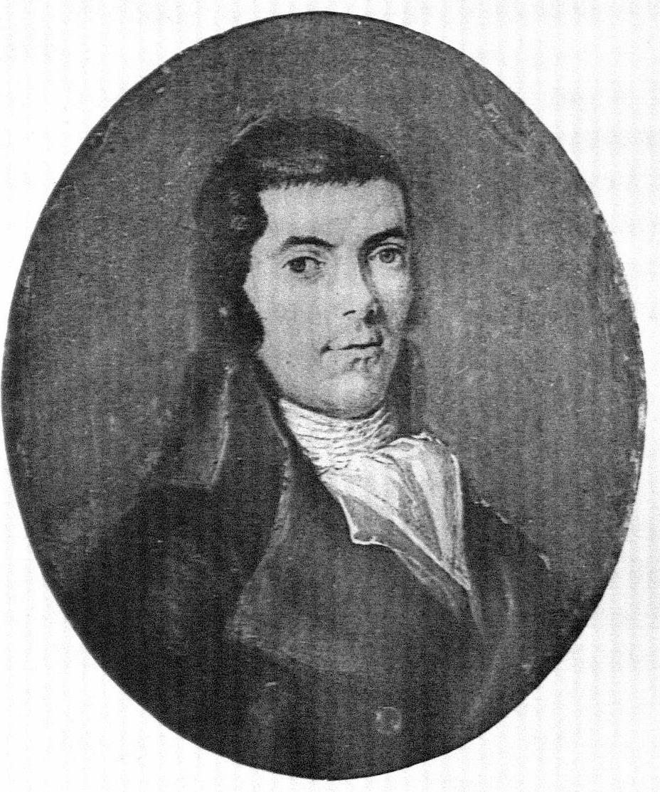 Dominique Cavaillé-Coll (1771–1862) d'après une miniature